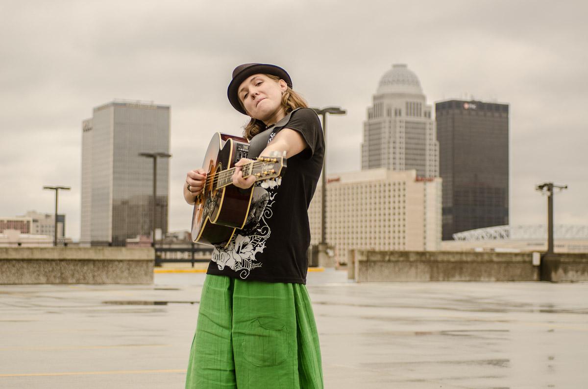 Joon Wolfsberg in Louisville (Kentucky / USA)